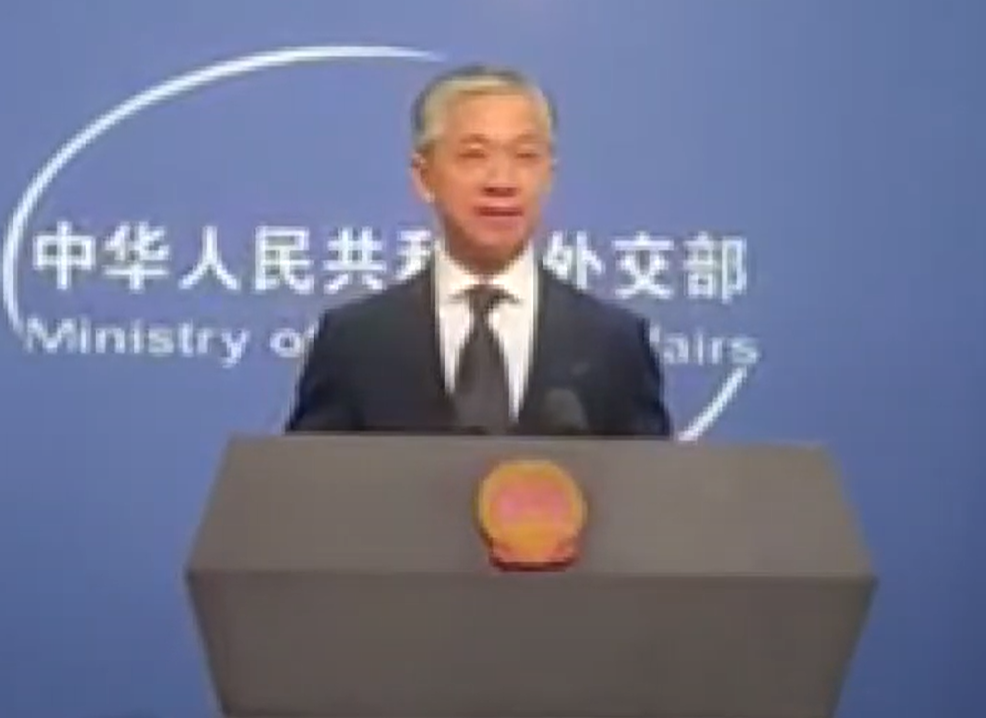 中文（中国大陆）: 在7月17日下午举行的外交部例行记者会上，外交部新闻司副司长汪文斌以发言人身份正式亮相，成为外交部第32任发言人。公开资料显示，汪文斌1971年4月生，1993年进入外交部工作，曾任中国驻突尼斯大使。目前，外交部共有华春莹、赵立坚、汪文斌三位发言人。